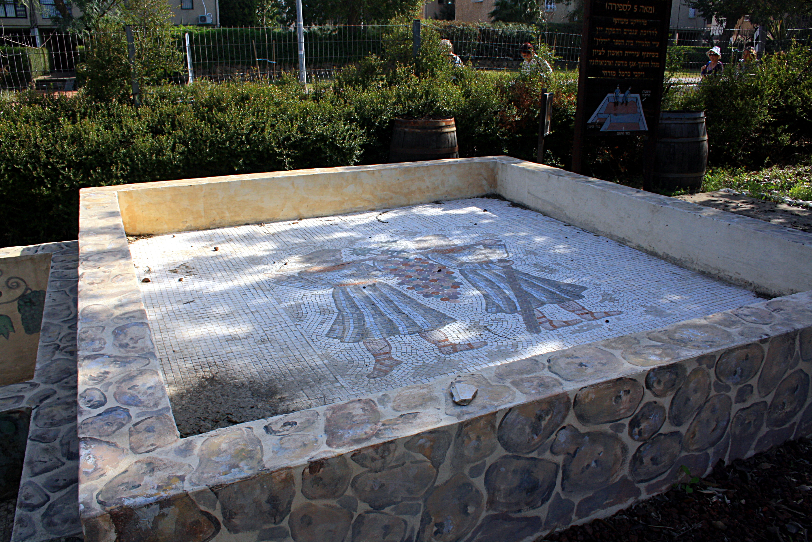 גת לימודית שנבנתה על פי מודל של גת ביזנטית. he:גן הגתות, ראשון לציון.